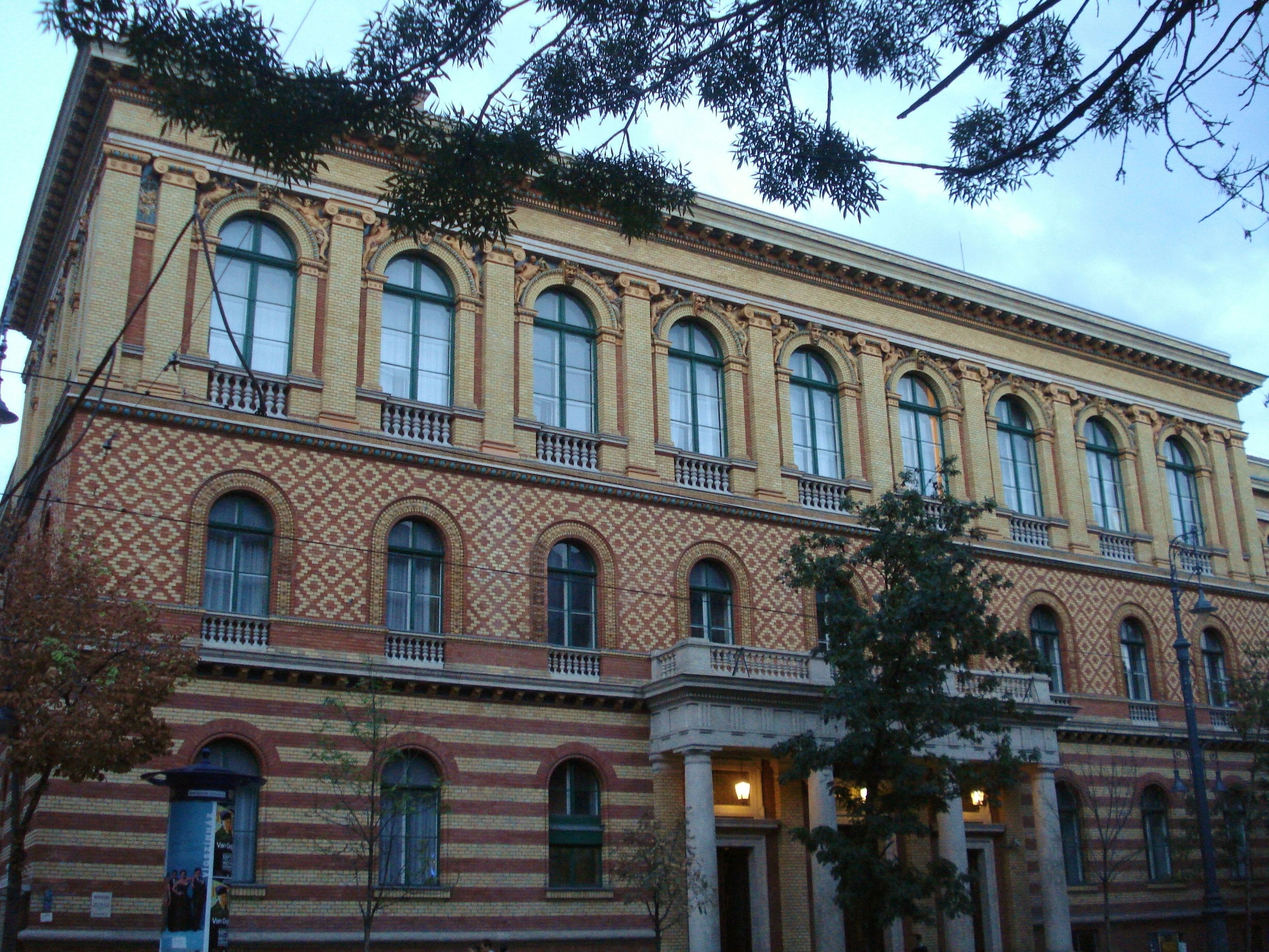 Eötvös Loránd Tudományegyetem, Budapest VIII. kerület, Múzeum körút 6–8. This is a photo of a monument in Hungary. Identifier: 944